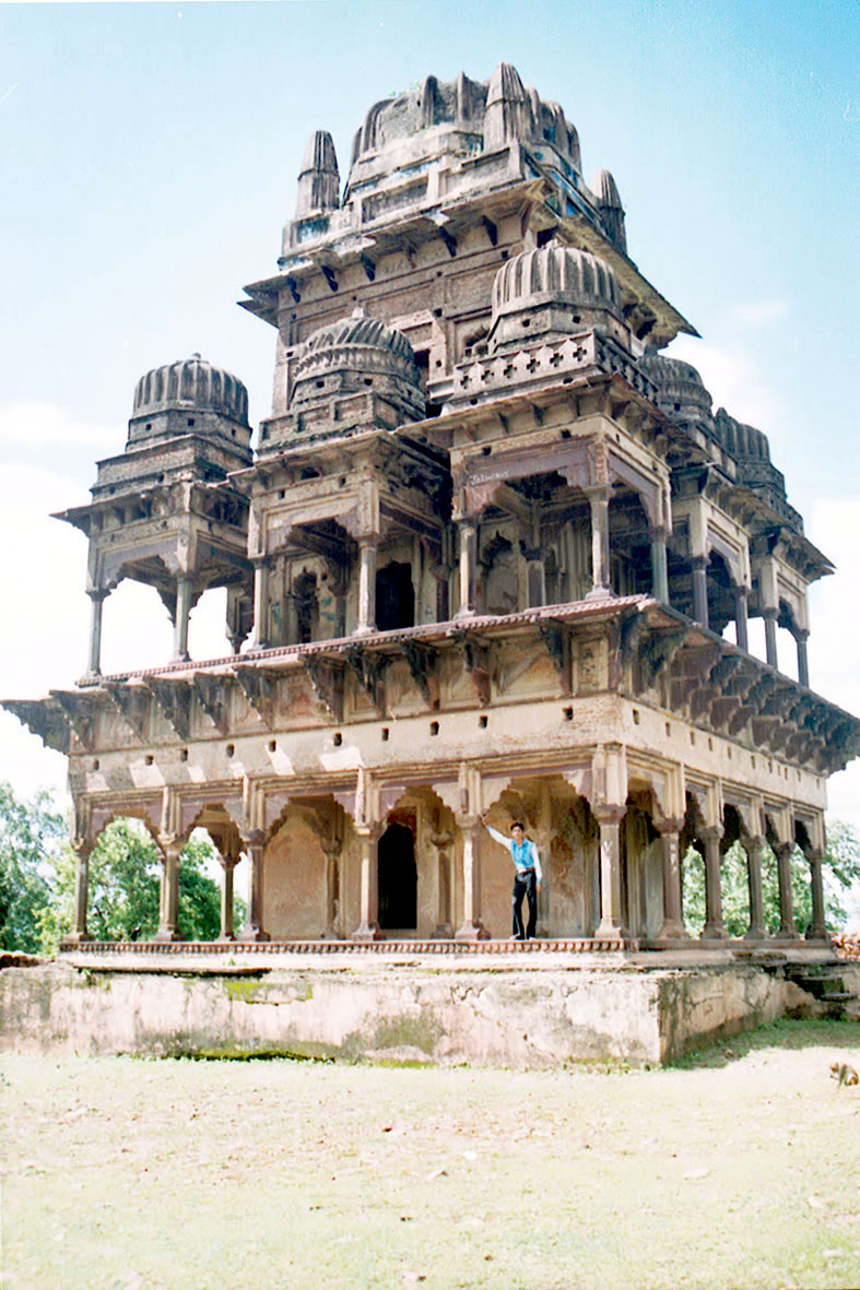 गढ़पहरा (सागर) के शीशमहल के पुरावशेष